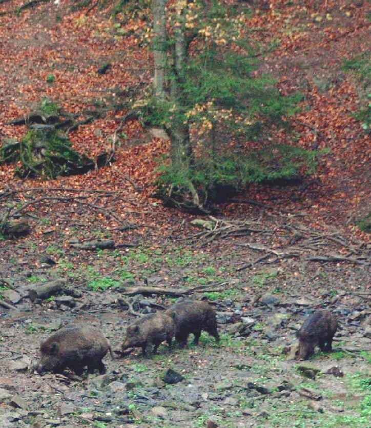 Een groep wilde zwijnen in de Ardennen. Eigen opname van 12 november 2005, nabij La Glaise, beschikbaar gesteld voor publiek domein. Licensing Categorie:Afbeelding dier